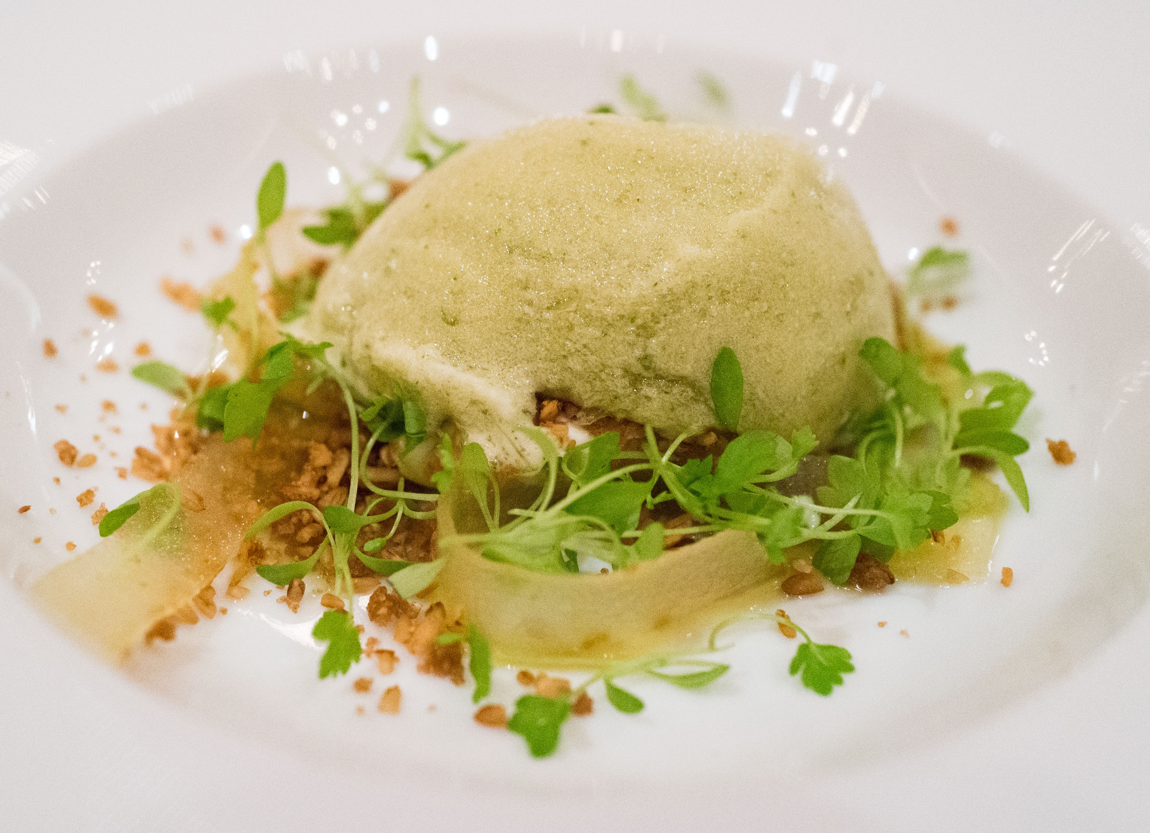 Fennel and apple sorbet, Skyr foam, fried oats. apples, celery